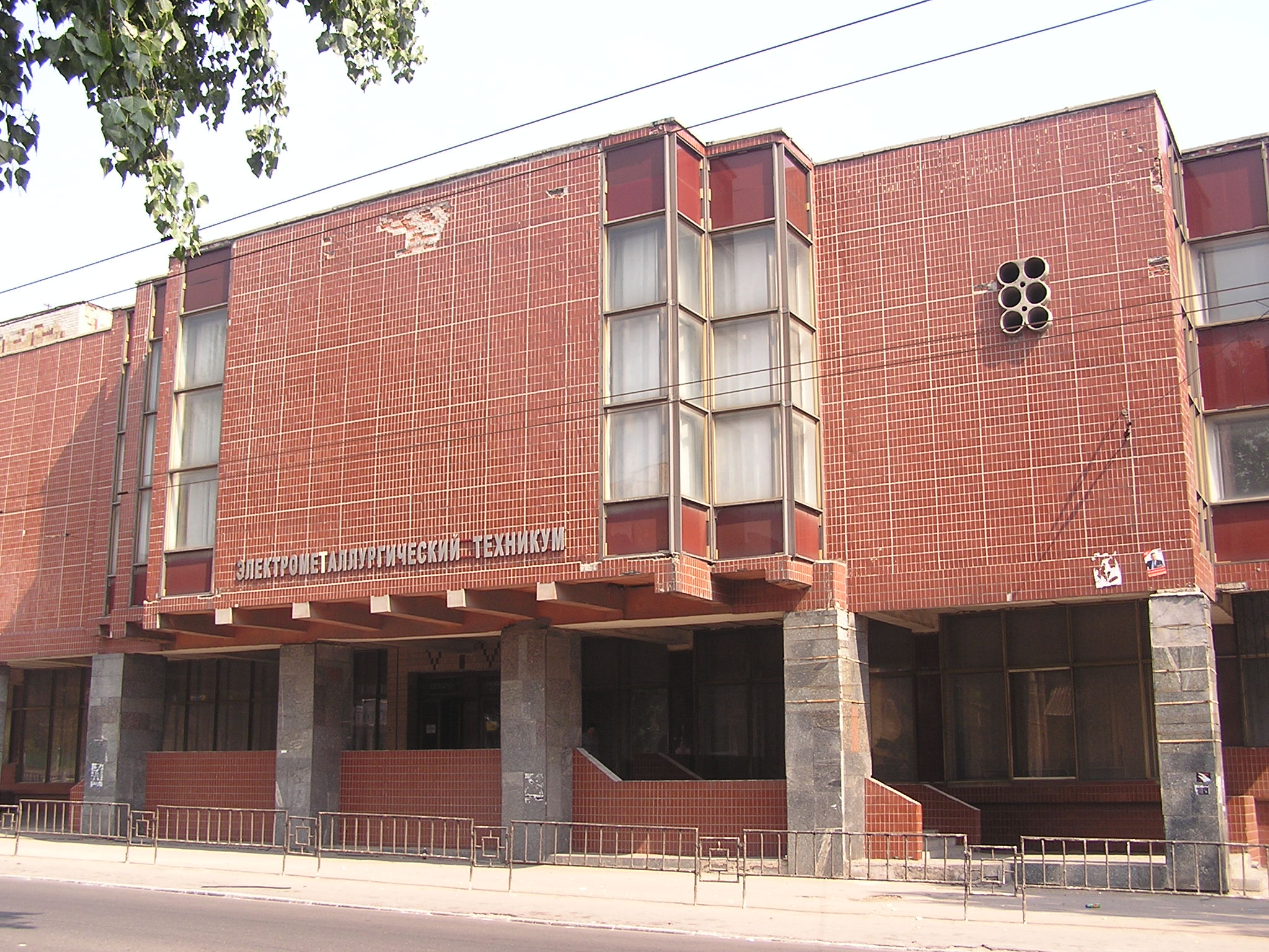 Донецк. Электрометаллургический техникум